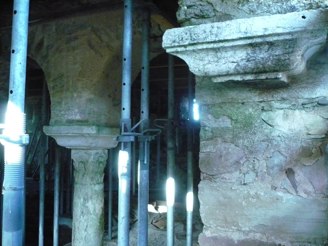 Igreja de São Gião da Nazaré - obras de restauro